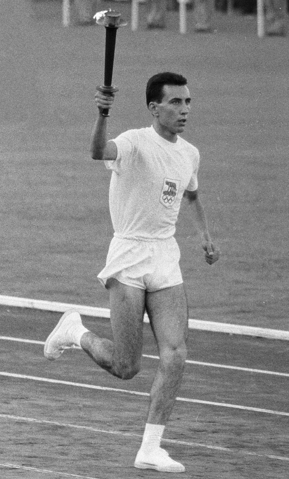 Olympische Spelen te Rome, nr. 36 binnen brengen Olympische vlag, nr. 37 binnenbrengen Olympisch vuur. Location: Italië, Rome